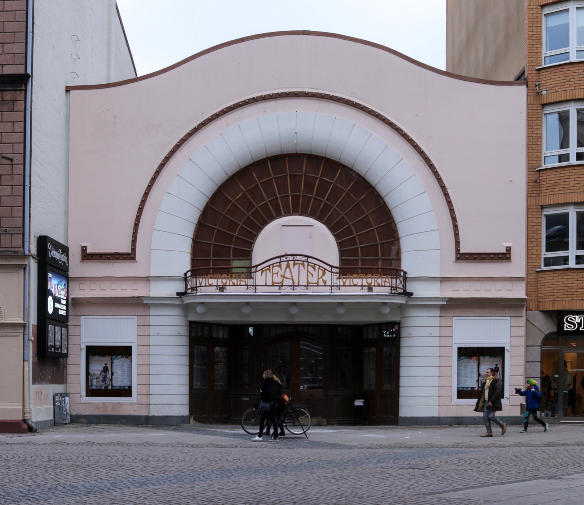 Viktoriateatern Malmö